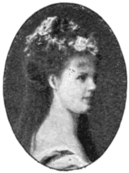 Skådespelerskan Olga Sandberg